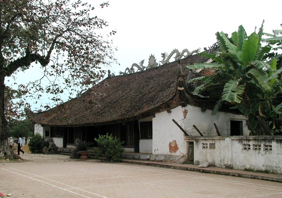 Đình Thổ Tang, thị trấn Thổ Tang, huyện Vĩnh Tường, tỉnh Vĩnh Phúc. Thổ Tang communal house, Thổ Tang town, Vĩnh Tường district, Vĩnh Phúc province, Việt Nam.